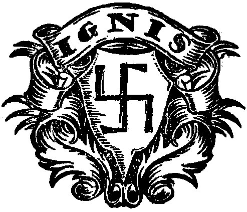 logo wydawnictwa Ignis